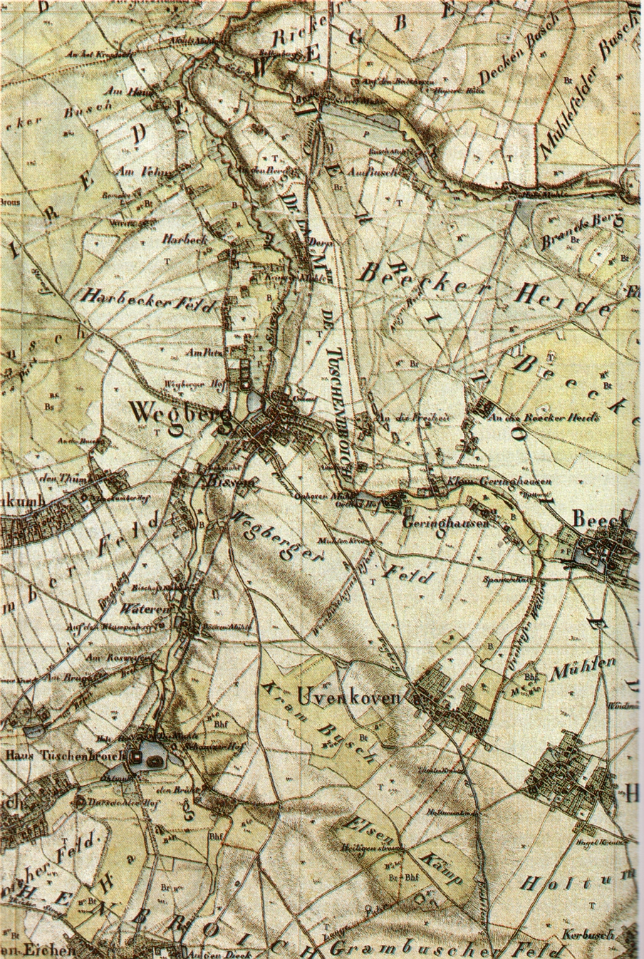 Map of Marie de Wegberg; Kartenaufnahme des Rheinlands von Tranchot/Müffling, (Aufnahme von 1806/07)